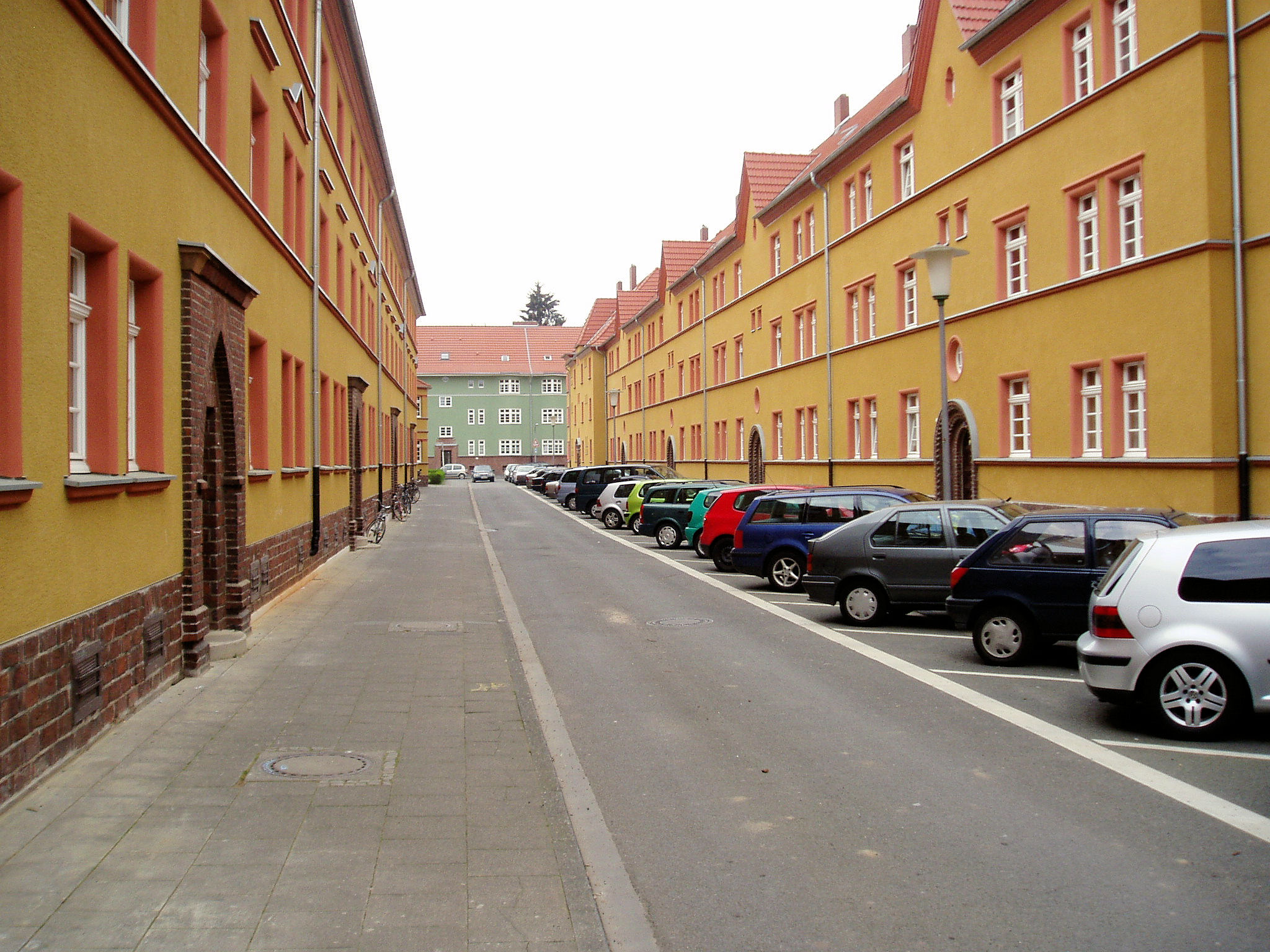 sanierter Straßenzug an der Erfurter Str. in Köln-Höhenberg